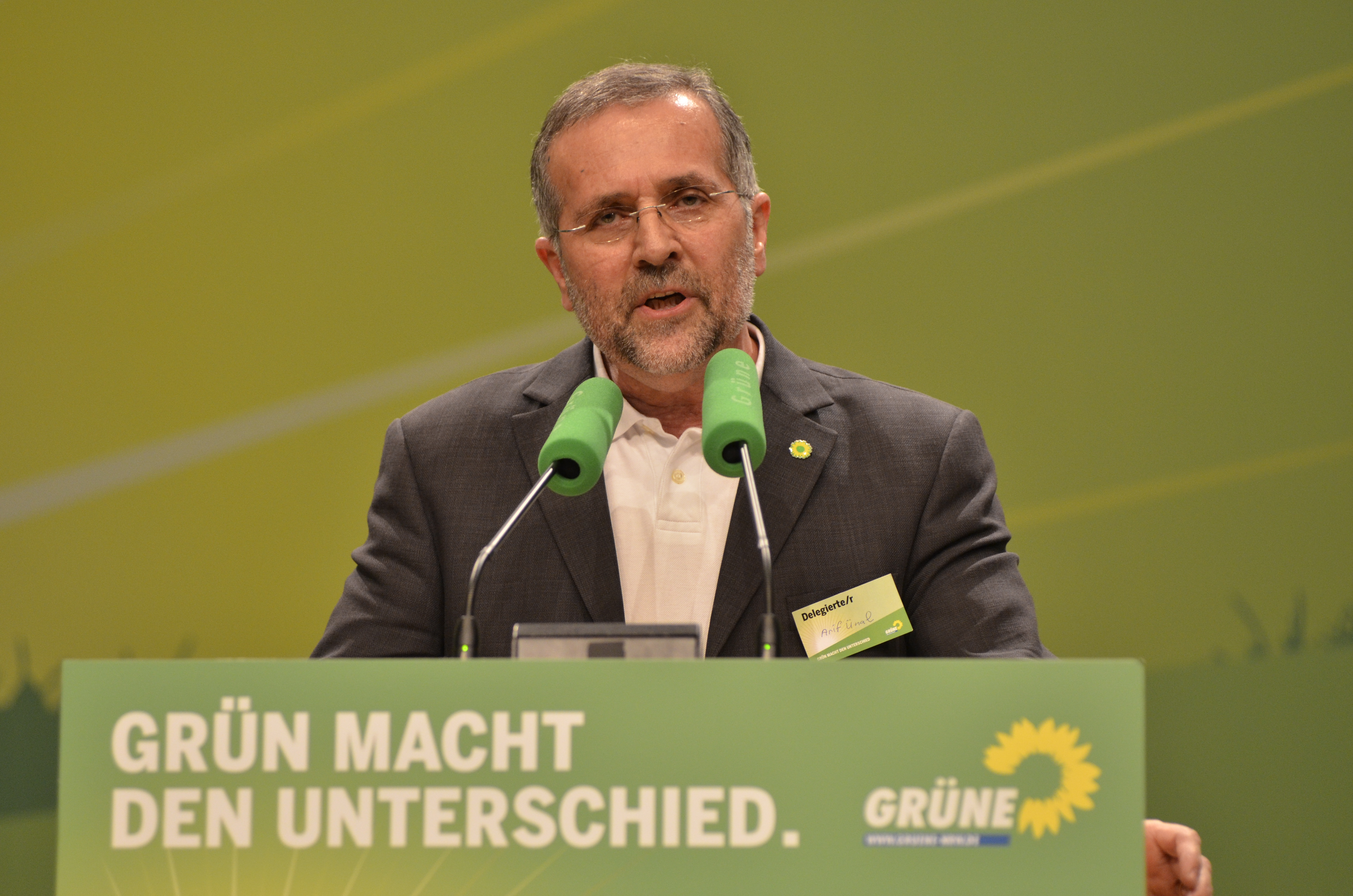 Arif Ünal 2012-03 LDK Essen